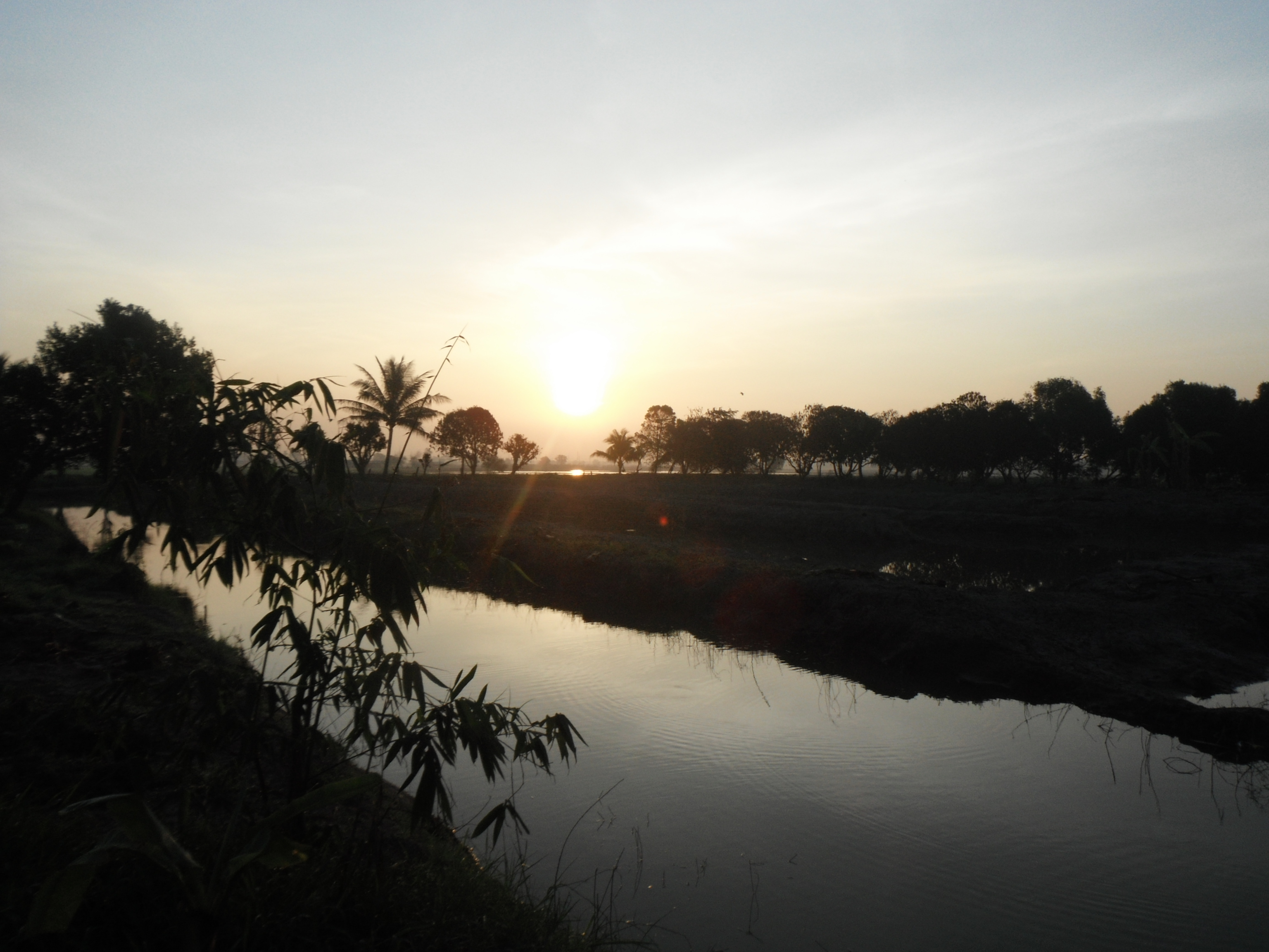 Chao Chet, Sena District, Phra Nakhon Si Ayutthaya 13110, Thailand